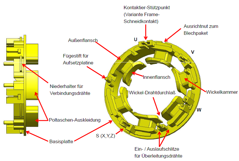 Beispiel der Endscheibe eines Vollblechschnittstators mit diversen Gestaltungsmerkmalen